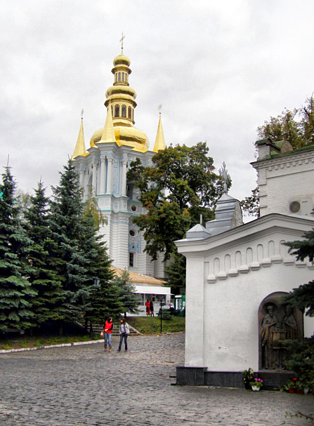 Дзвіниця Дальніх печер Києво-Печерської лаври